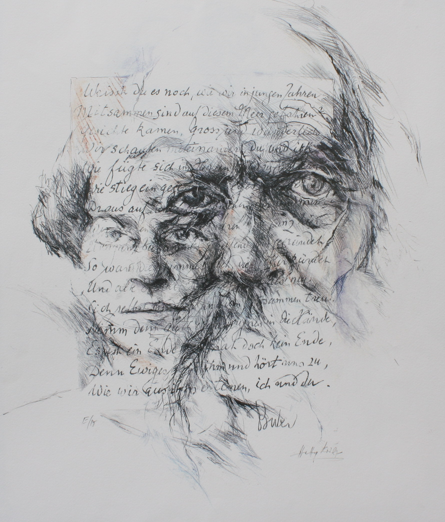 Hetty Krist, Martin Buber (Farblithographie)